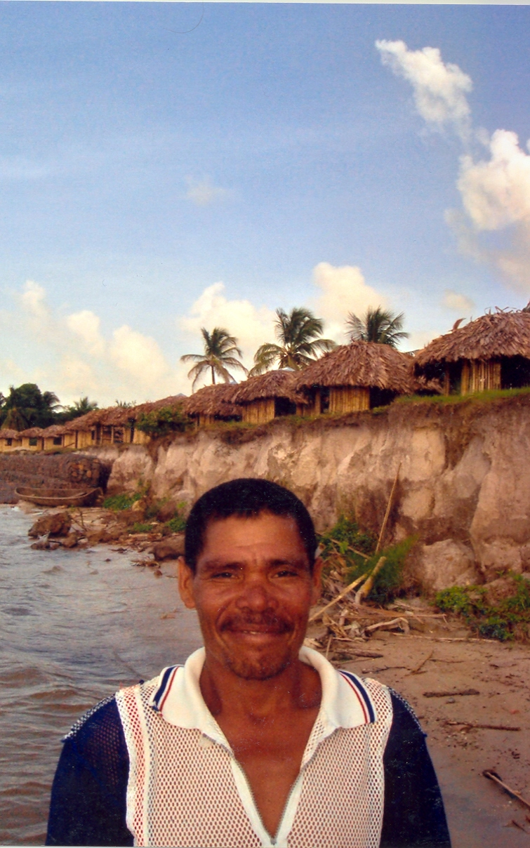 Der Miscito Orlando bestreitet den Lebensunterhalt seines Dorfes Awas (Pearl Lagoon) an der nicaraguensischen Pazifikküste durch Fischerei und ein kleines Tourismus-Projekt (s. Hintergrund), Awas, Nicaragua, 2004